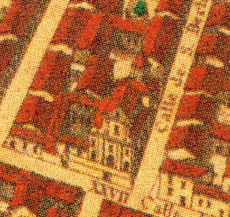 Topografía de la Villa de Madrid descrita por Don Pedro Texeira en 1656, en la cual se demuestran todas las calles al largo y ancho de cada una de ellas, las rinconadas y lo que tuercen las Plazas, fuentes, jardines y huertas con la disposición que tienen las parroquias, Monasterios y Hospitales están señalados sus nombres con letras y números que se hallaran en la tabla y los demás edificios, torres y delanteras de las casas de la parte que mira al Mediodía están sacadas al natural que se podrán tocar las puertas y ventanas de cada una de ellas.